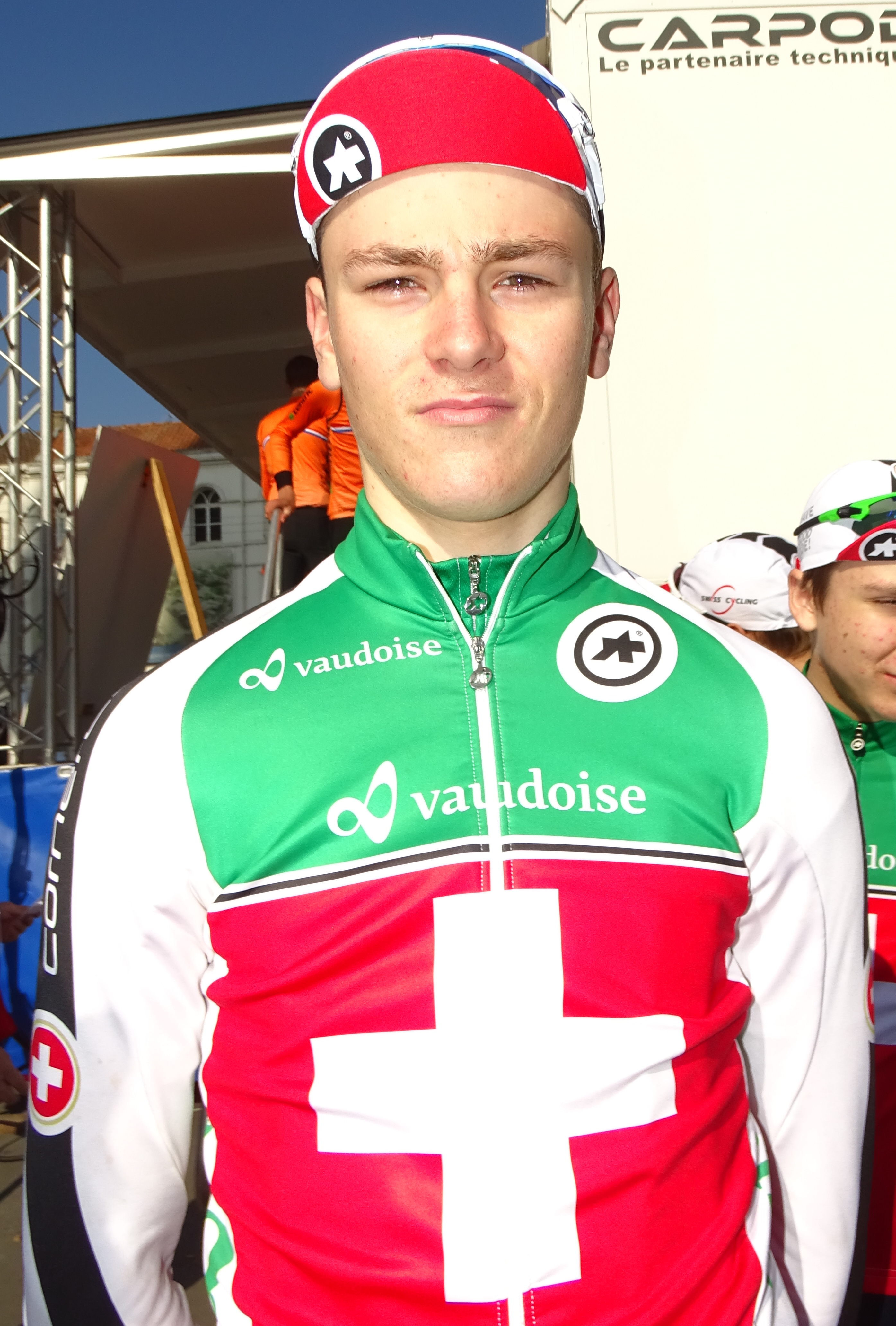 Reportage réalisé le dimanche 9 avril à l'occasion du départ du Paris-Roubaix juniors 2017 à Saint-Amand-les-Eaux, France.